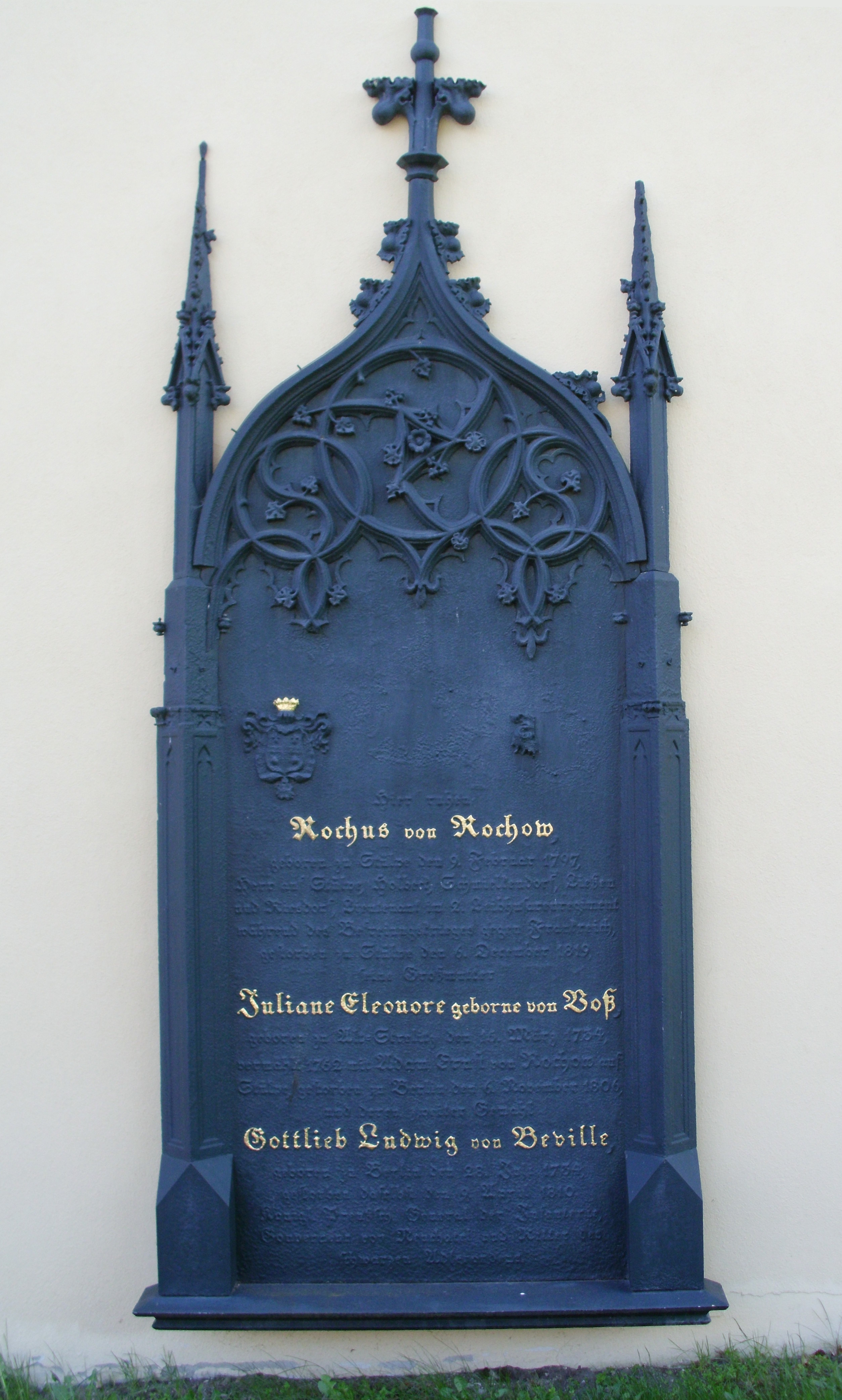 Grabplatte der Familie des Adolf Friedrich von Rochow an der Kirche von Stülpe, Gemeinde Nuthe-Urstromtal, Brandenburg